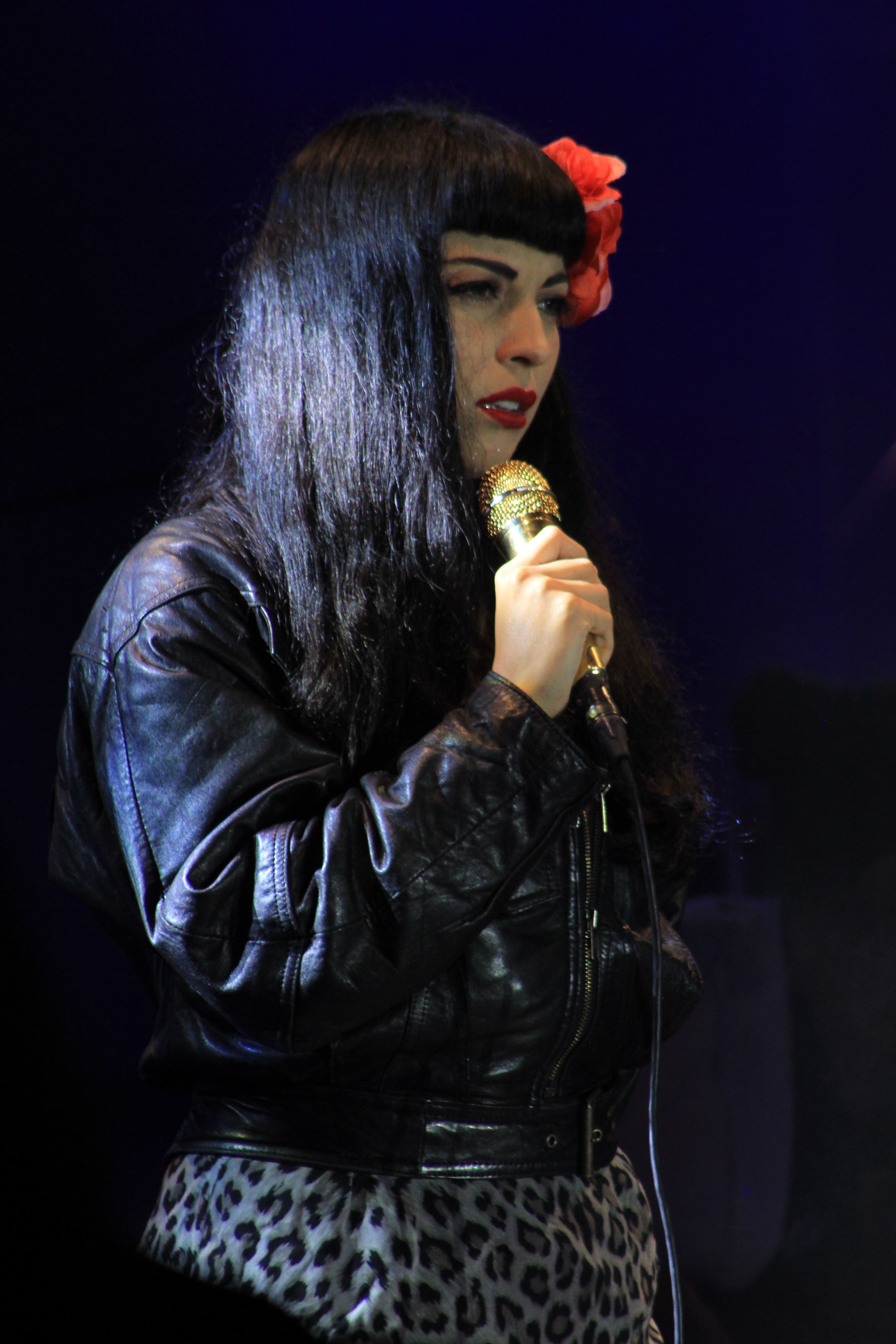 Mon Laferte en Querétaro